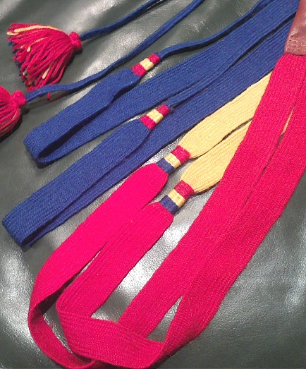 Lagda, flätade, kvinnoskoband, Gällivare samedräkt. Tillverkade 2011 Sámegiella: Nissuna vuoddagit, Váhtjer, Ruoŧŧas. Duojar Ranssa Valbora Eva Maria